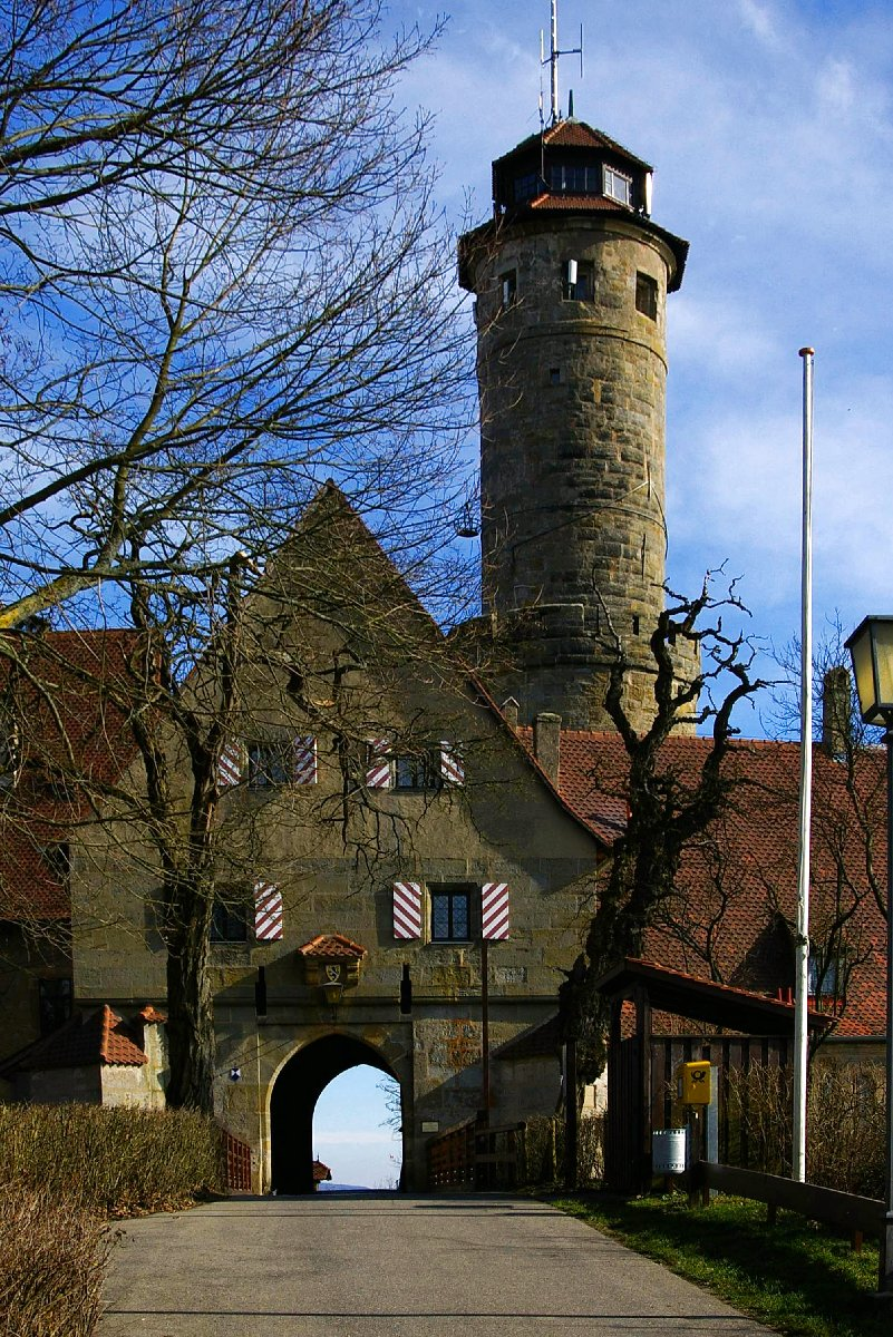 Altenburg - Eingangstor